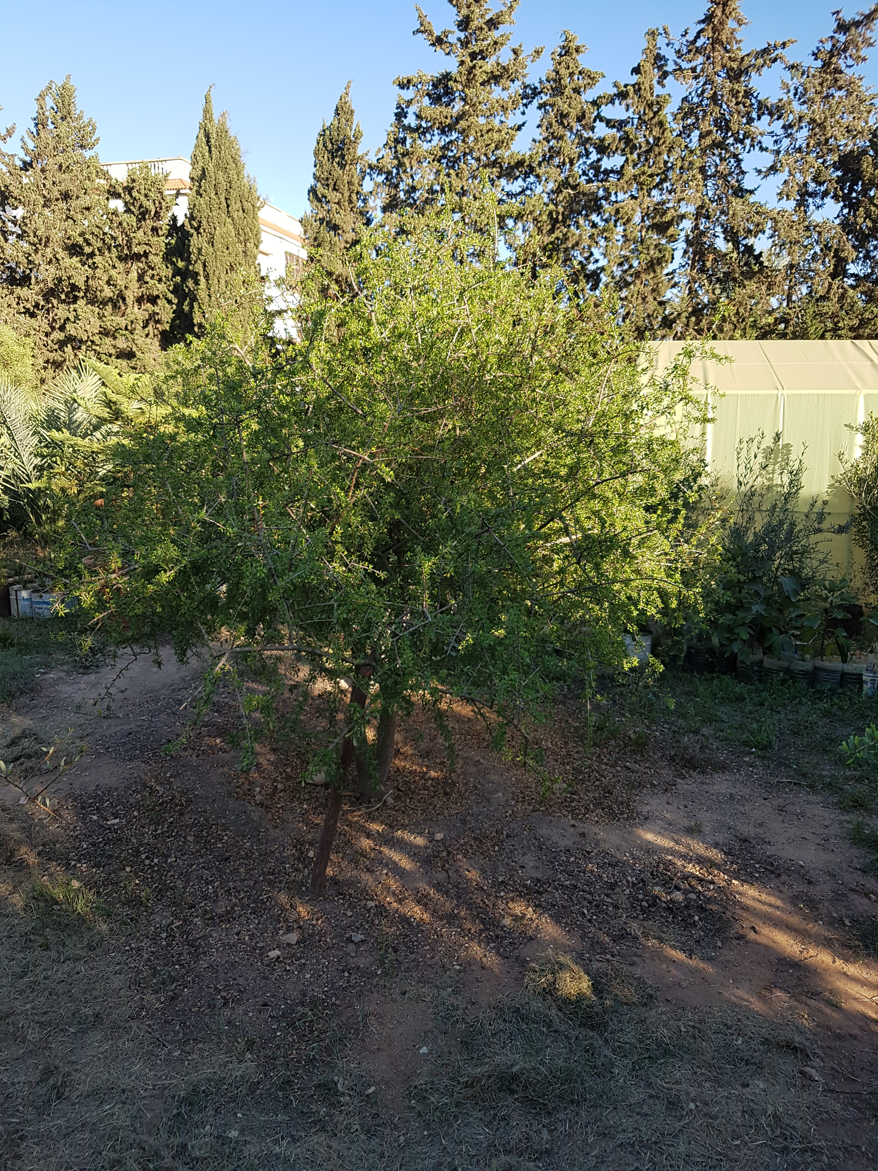 Event Wiki Loves Monuments 2018 in Algeria Photo Walk in Mostaganem Algeria Arganier